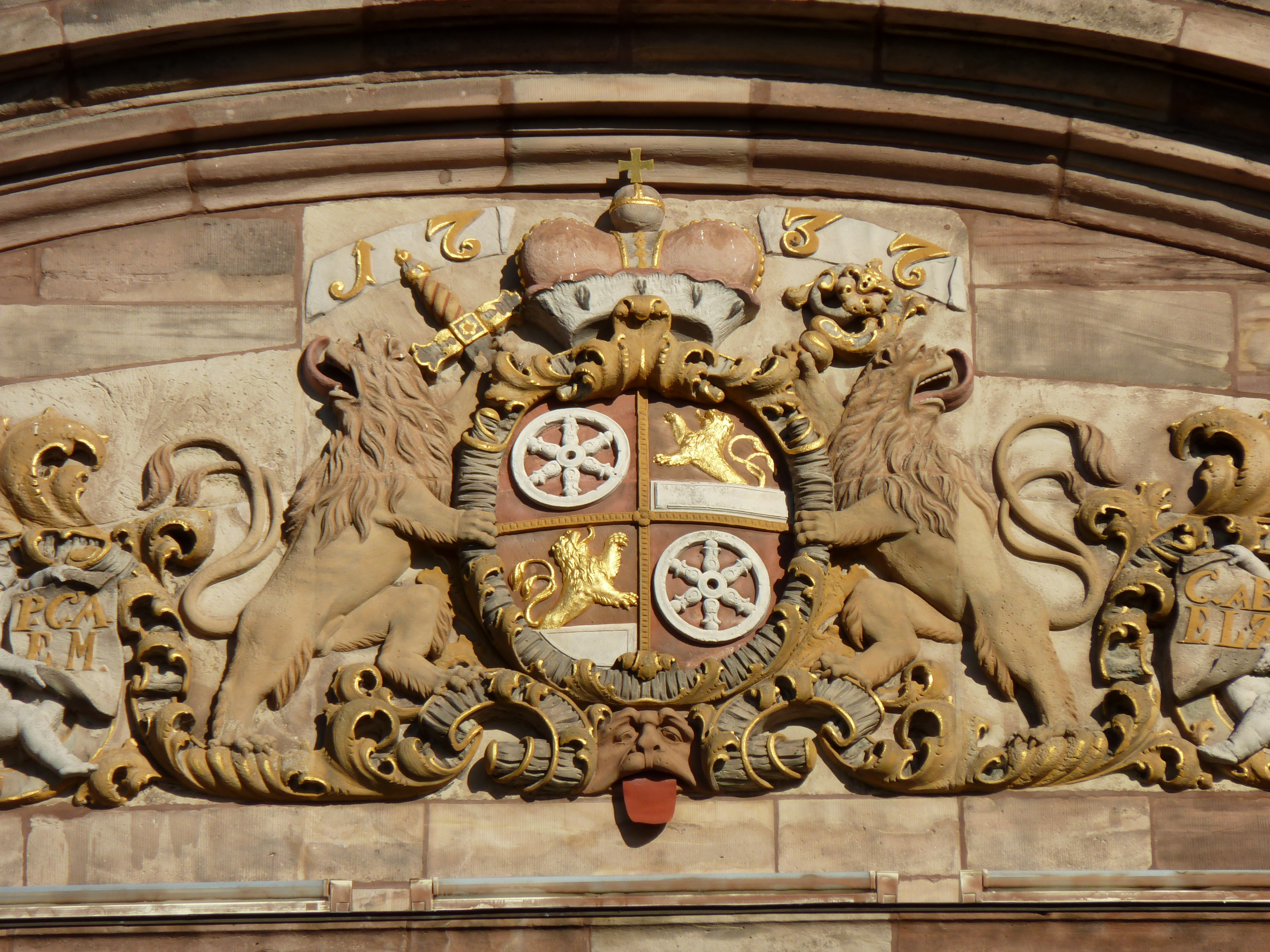 Wappen im Giebelfeld des Mainzer Schlosses in Heilbad Heiligenstadt, Landkreis Eichsfeld, Thüringen, d. 1737 (Wappenrelief des Kurfürsten Philipp Karl von Eltz)